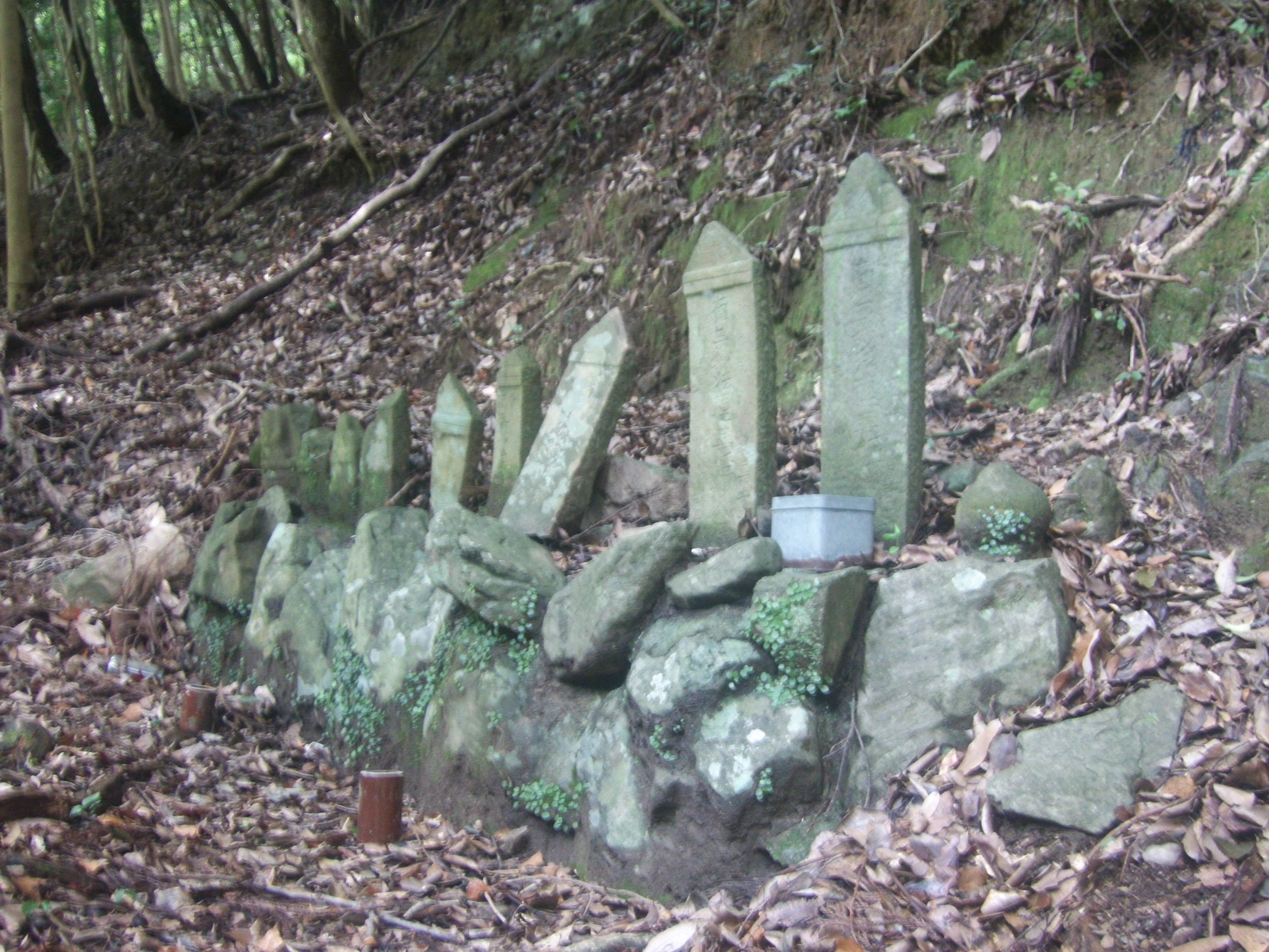 熊野古道・紀伊路の傍らに祀られる題目板碑